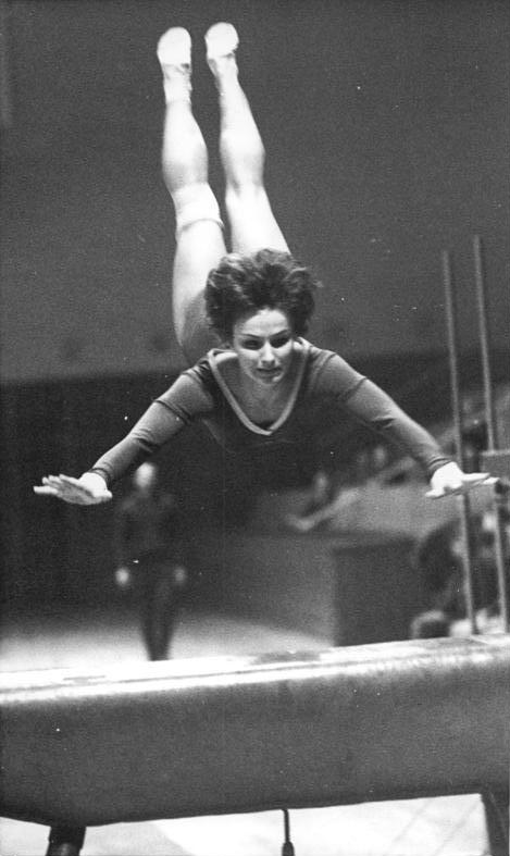 Erika Zuchold Zentralbild Wendorf-6-12-69 Berlin: DDR-Turnmeisterschaften der Frauen in der Berliner Dynamo-Sporthalle - Nach der Pflicht des olympischen Achtkampfes erreichte die Titelverteidigerin Erika Zuchold (SC Leipzig - Foto beim Pferdsprung) mit 37,75 Punkten den zweiten Platz.